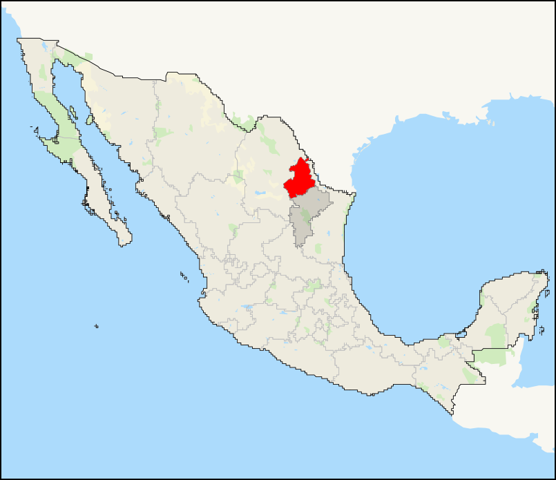 Mapa del distrito electoral federal 7 de Nuevo León ubicado en México